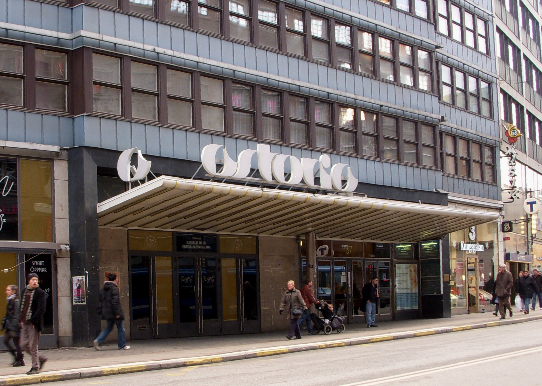 Biograf Astoria (f.d. Royal) vid Kungsgatan 37 i Stockholm